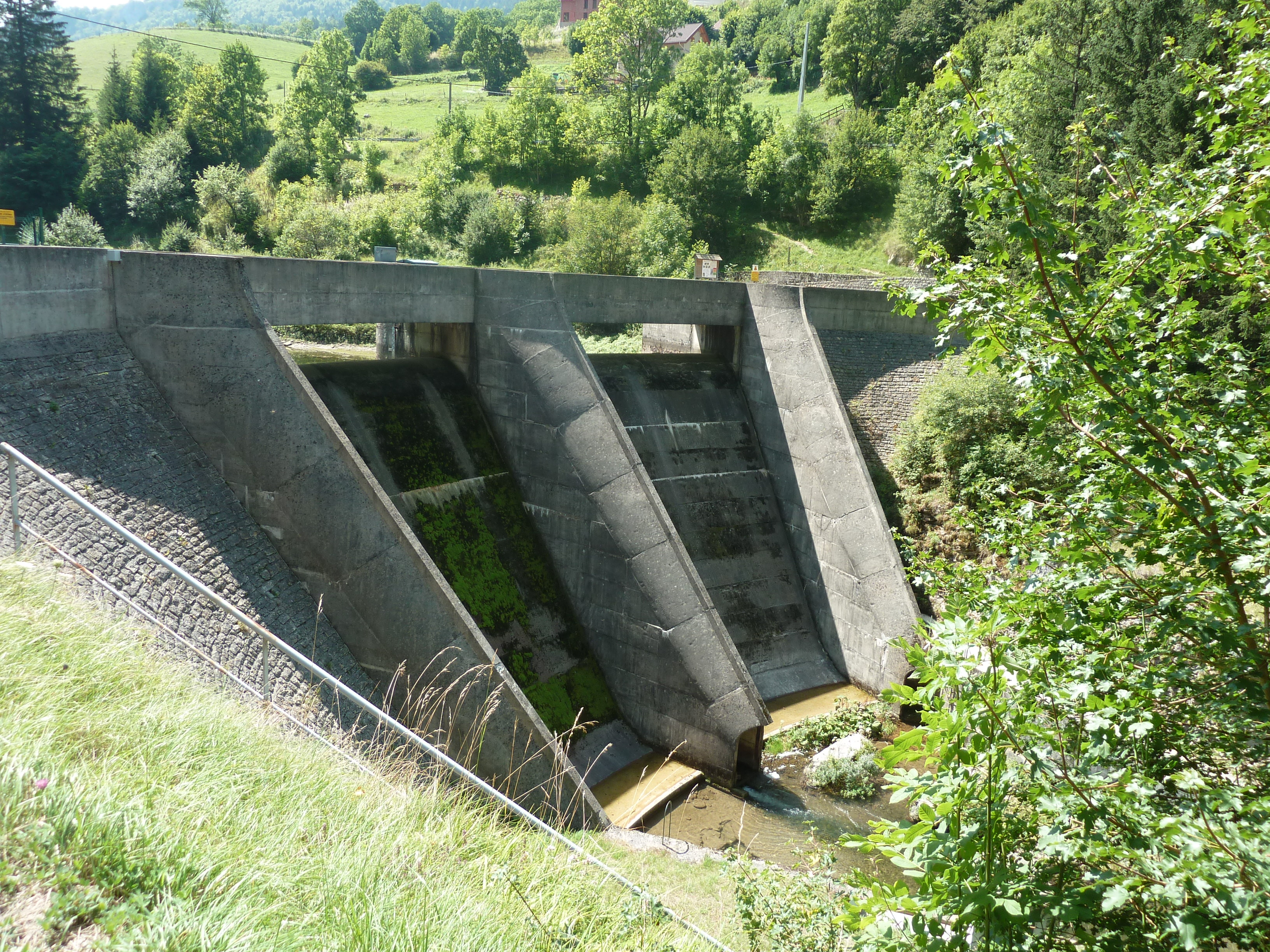 Barrage d'Engins (38) : Vue générale du barrage.